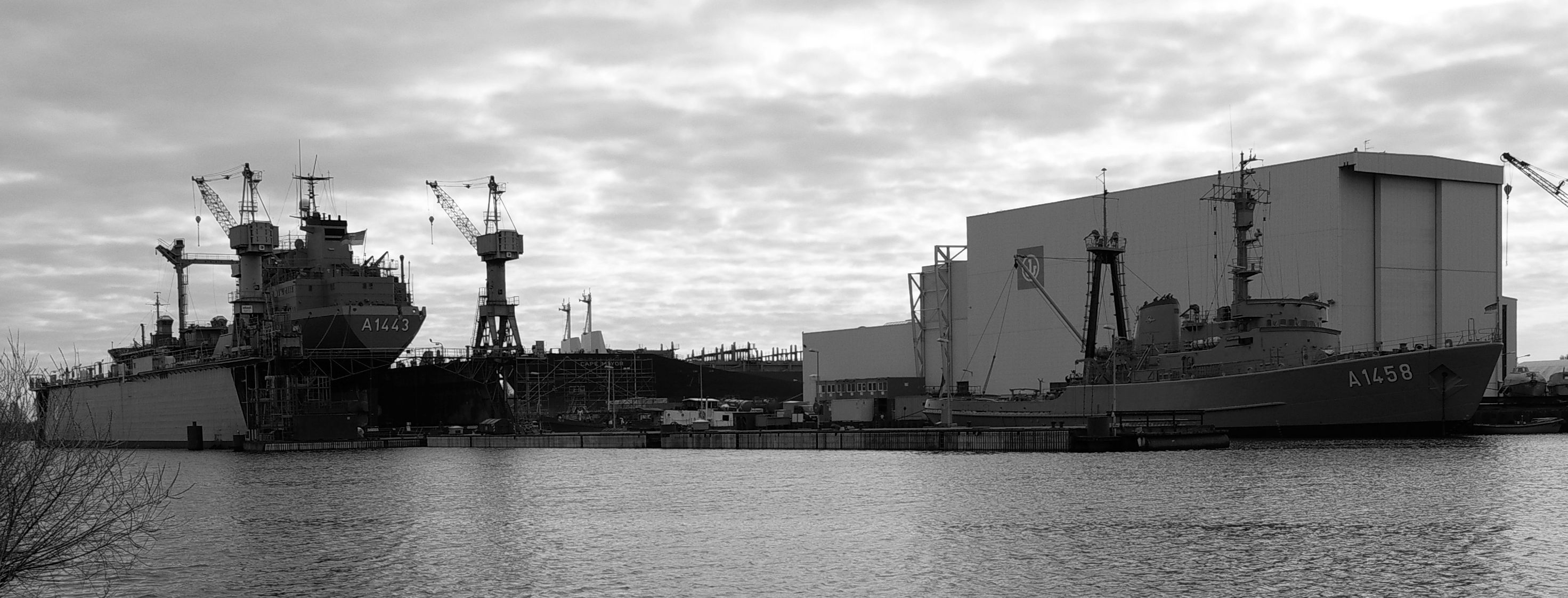 Neue Jade Werft, Werft Wilhelmshaven,Niedersachsen,Deutschland, Schwimmdock, Schiffbauhalle